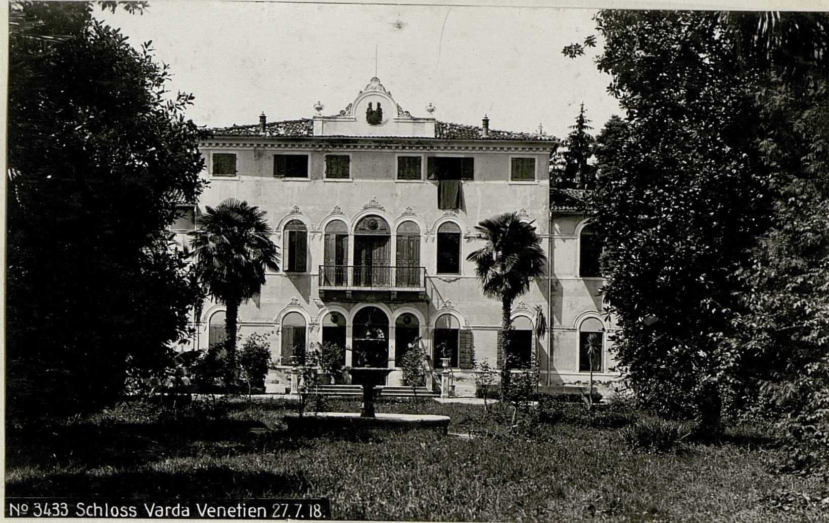 Schloss Varda Venetien 27.7.18.